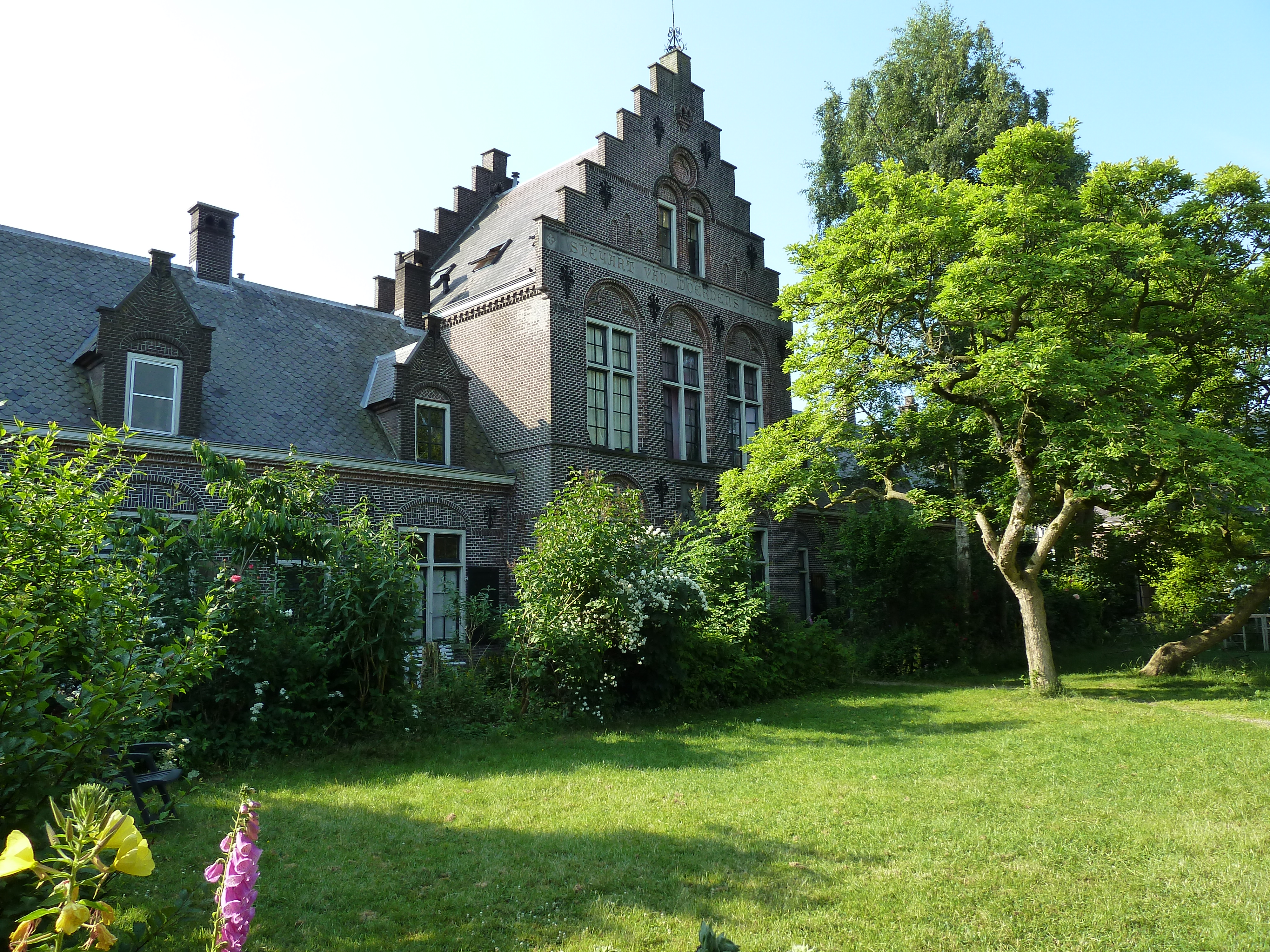 Speyart van Woerdenhofje, Kerkstraat, Utrecht, NL. Rijksmonumentnummer 514355.